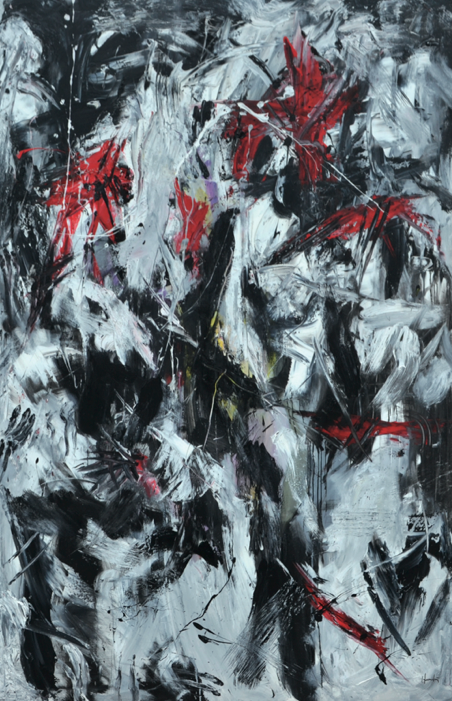 Energheia, 198,5×128,5 cm, Olio su tela, 2011, opera di Silvio Formichetti